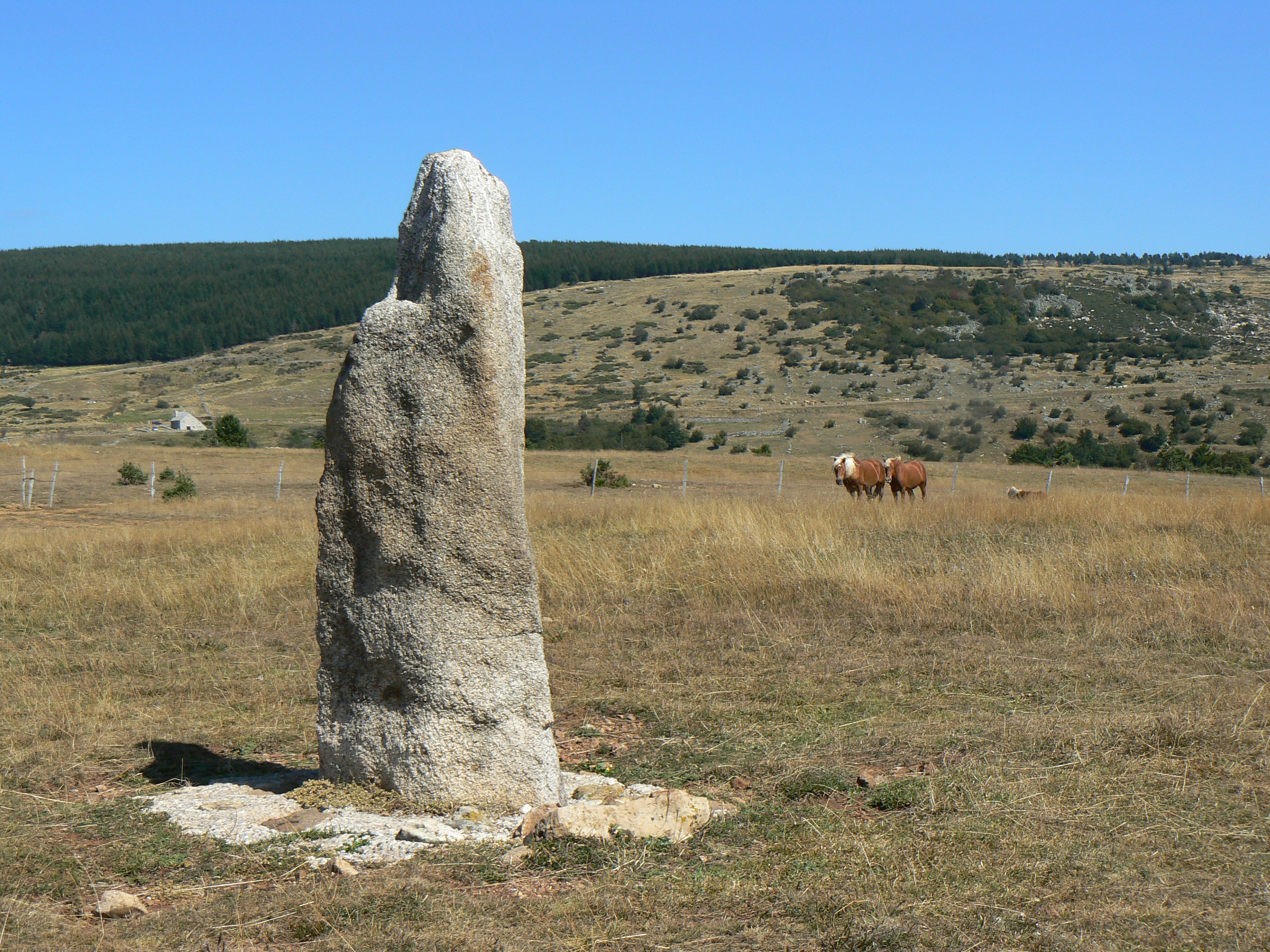 Menhir du groupe de Colobrières sur le site de la Cham des Bondons en Lozère (France)